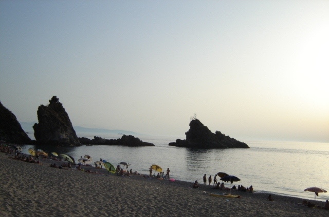 Palmi (Reggio Calabria), Scoglio dell'Olivella